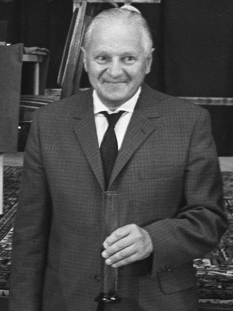 Hans Müller (Oostenrijk) bij de Internationale Schaakvierkamp te Bladel ter herdenking aan de 40 jaar geleden overleden Hongaarse grootmeester Richard Reti.